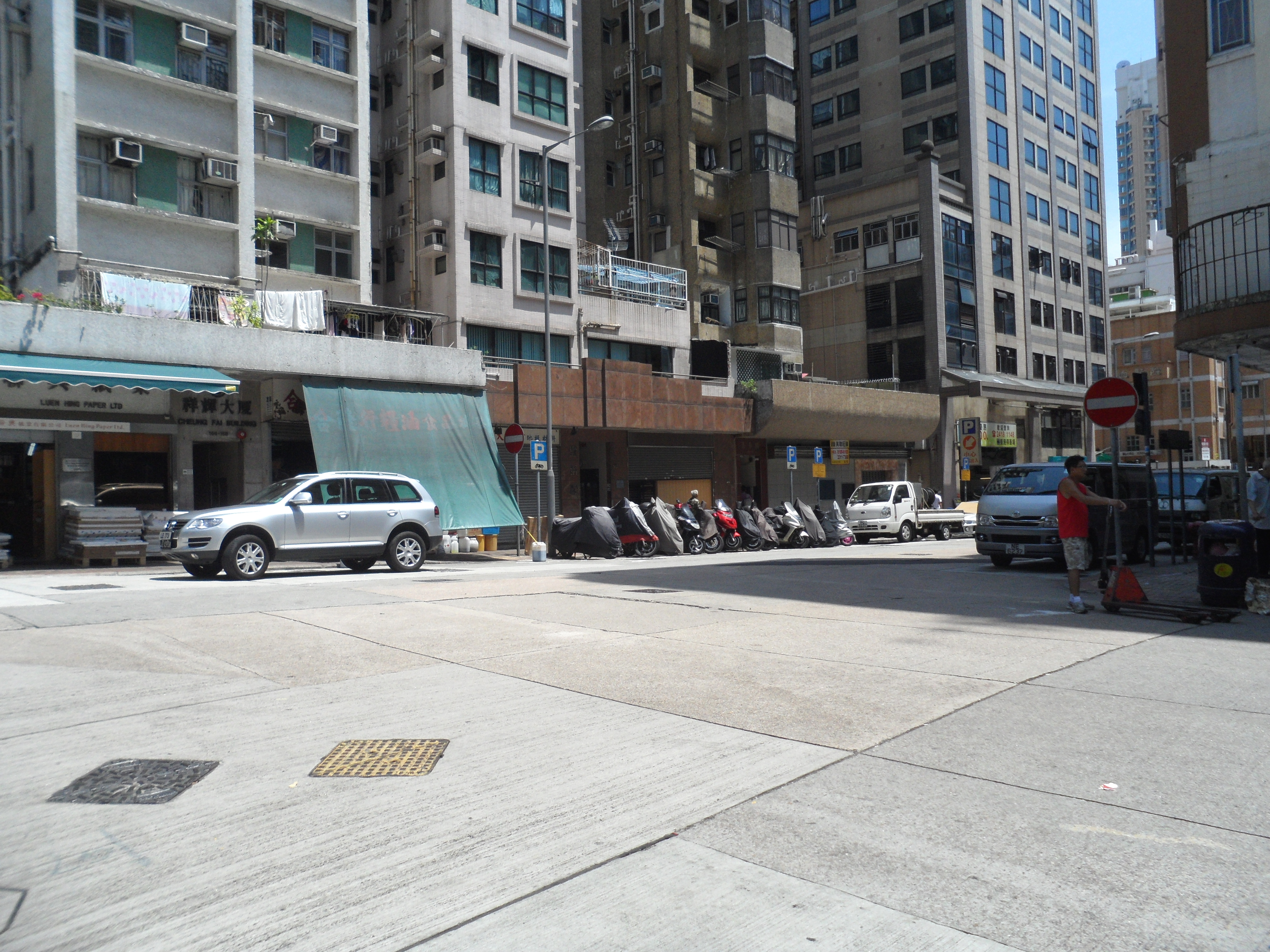 順寧道與九江街交界